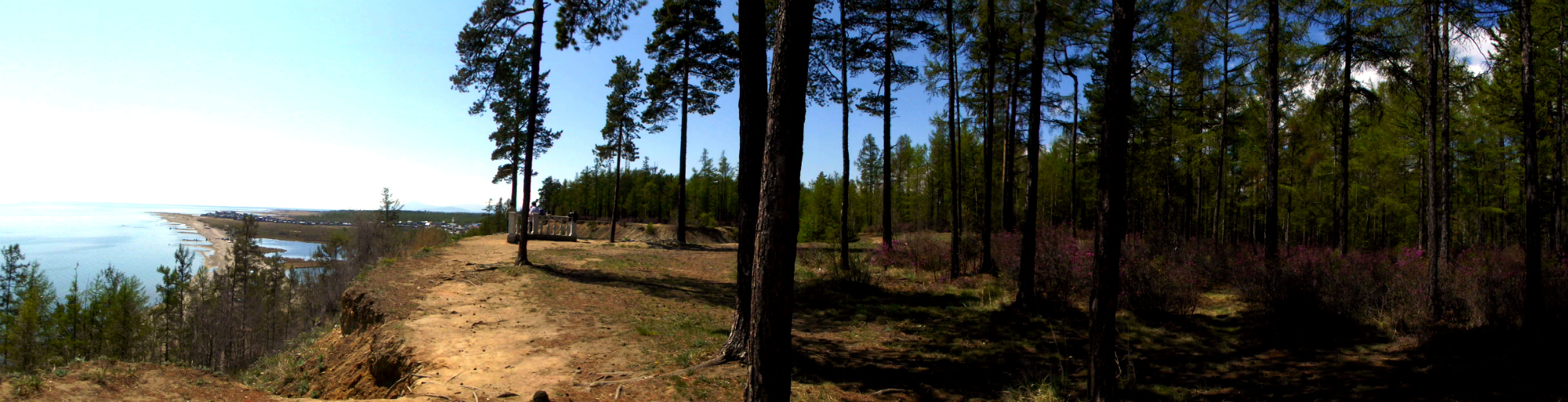 Северо-Байкальская, Северобайкальский район This image is related to the protected area of Russia number 0320099